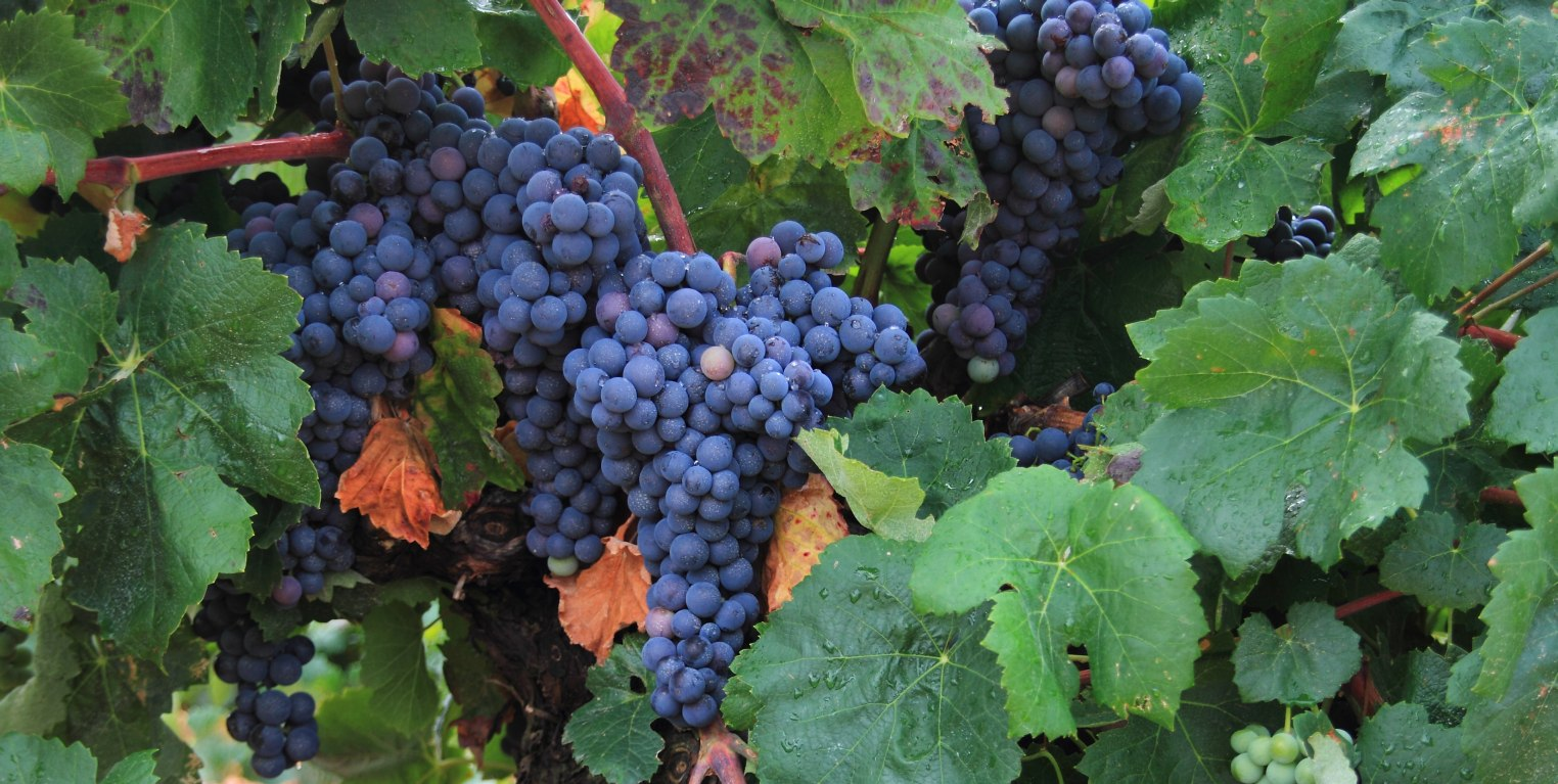 Red grape, Bobal